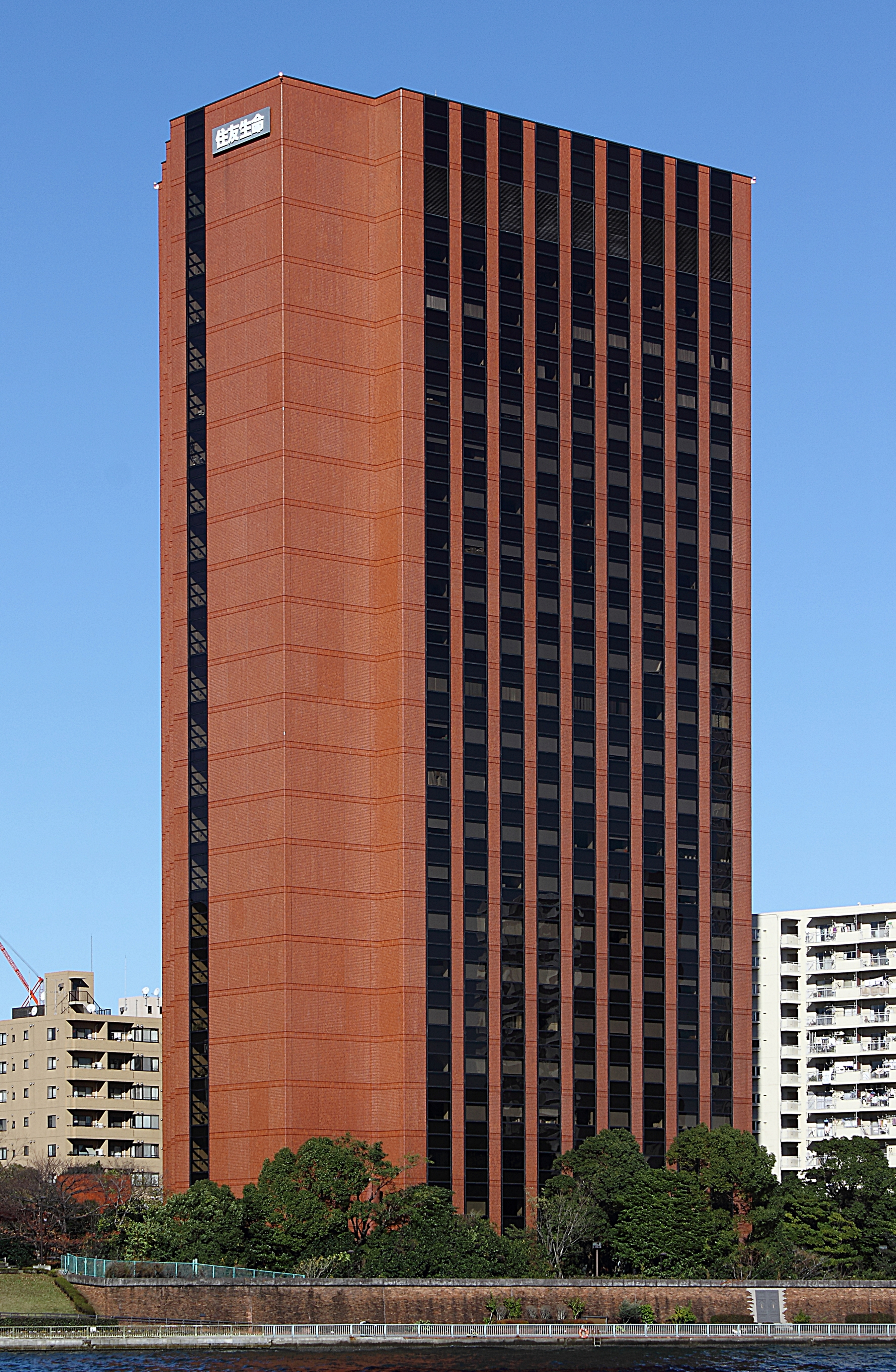 住友生命東京本社